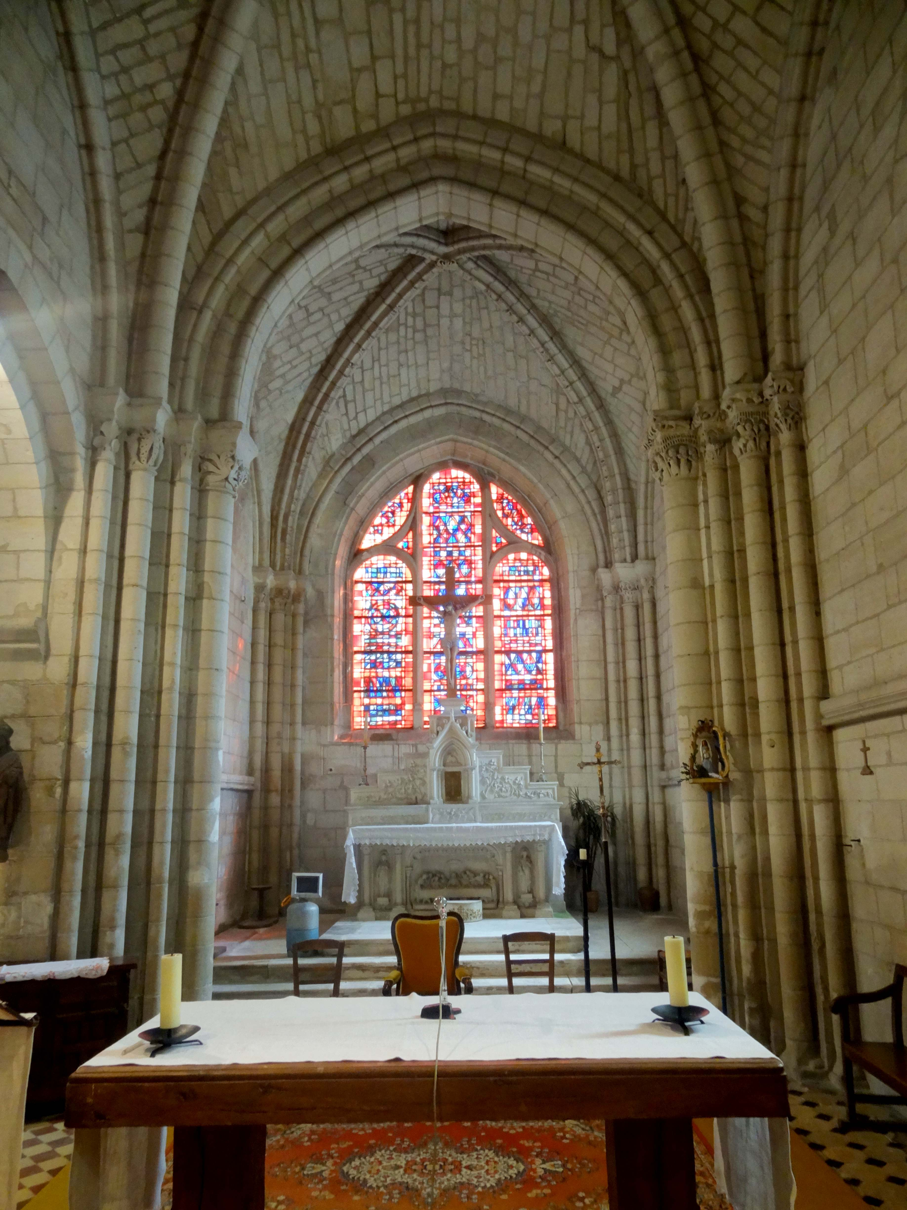 Intérieur de l'église - voir titre.